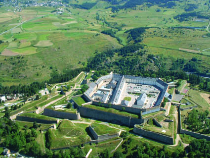 Mont-Louis place forte créée par Vauban en 1679